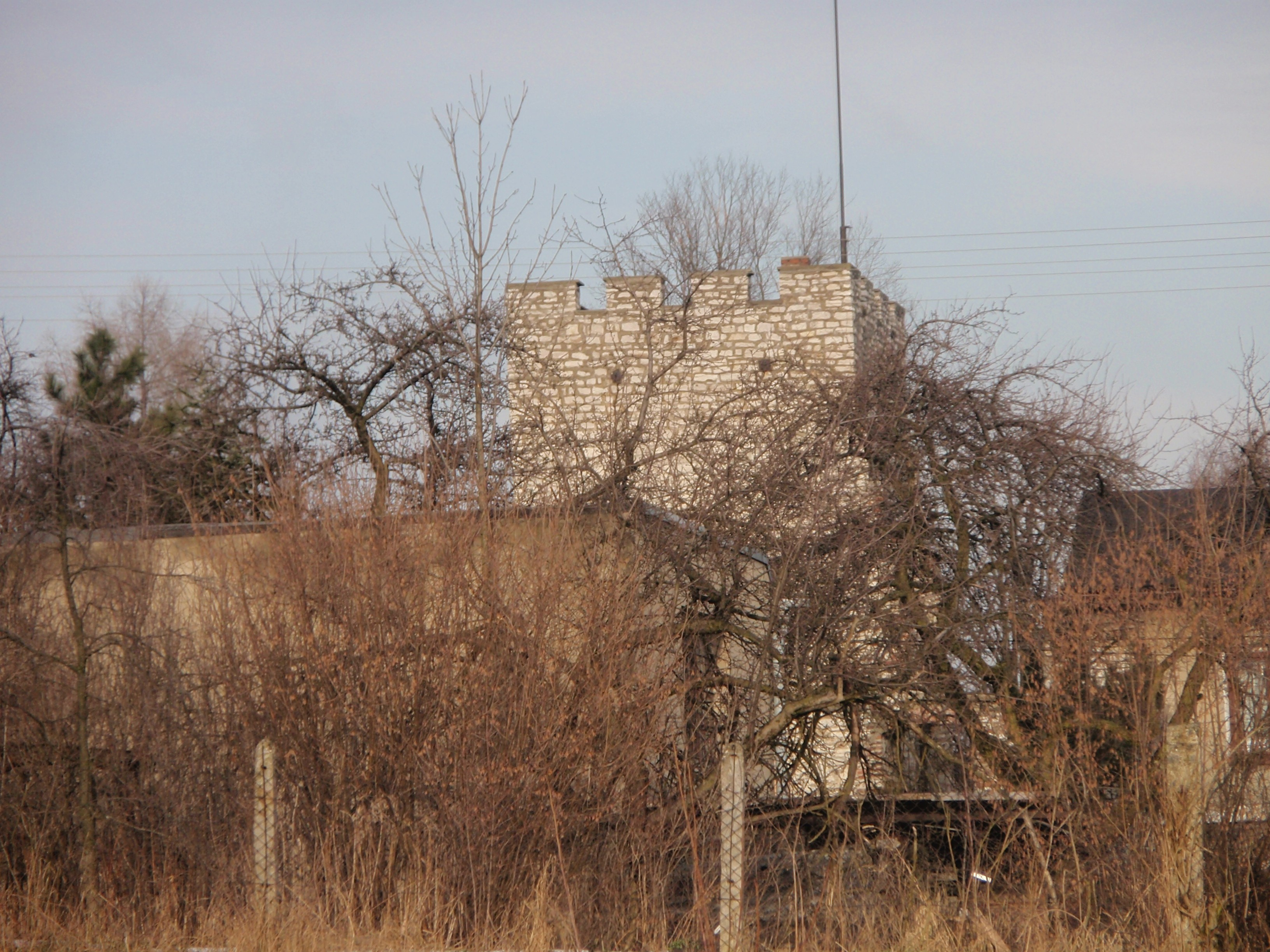 Wieżyczka dawnego browaru J. Niepielskiego w Sławkowie (woj. śląskie)